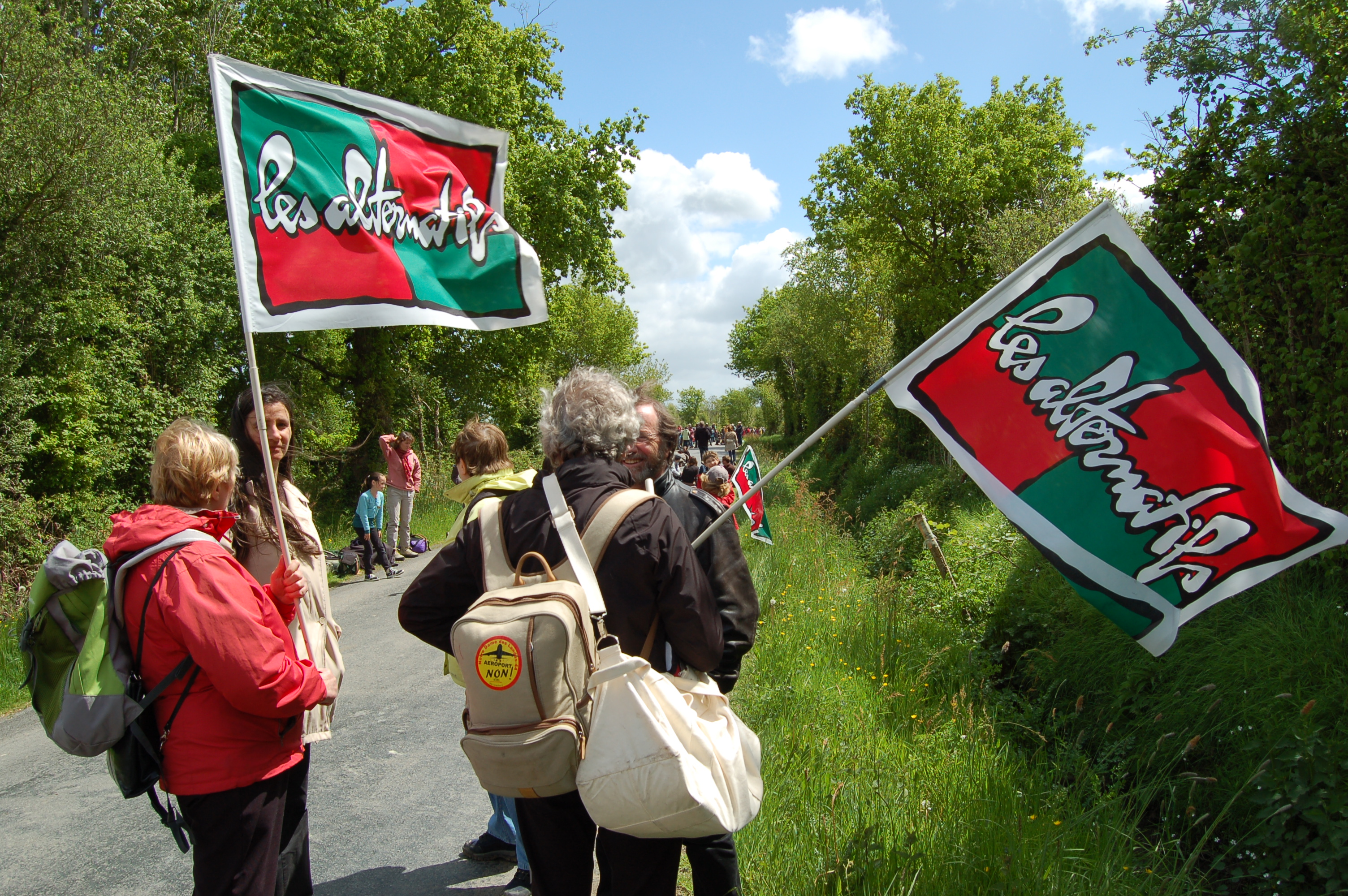 Militants du mouvement politique Les Alternatifs, opposés au projet d'aéroport du Grand Ouest.